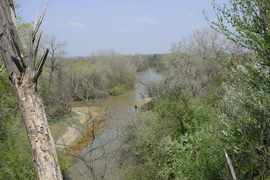 Timok Baley Bregovo April, Реката пролет